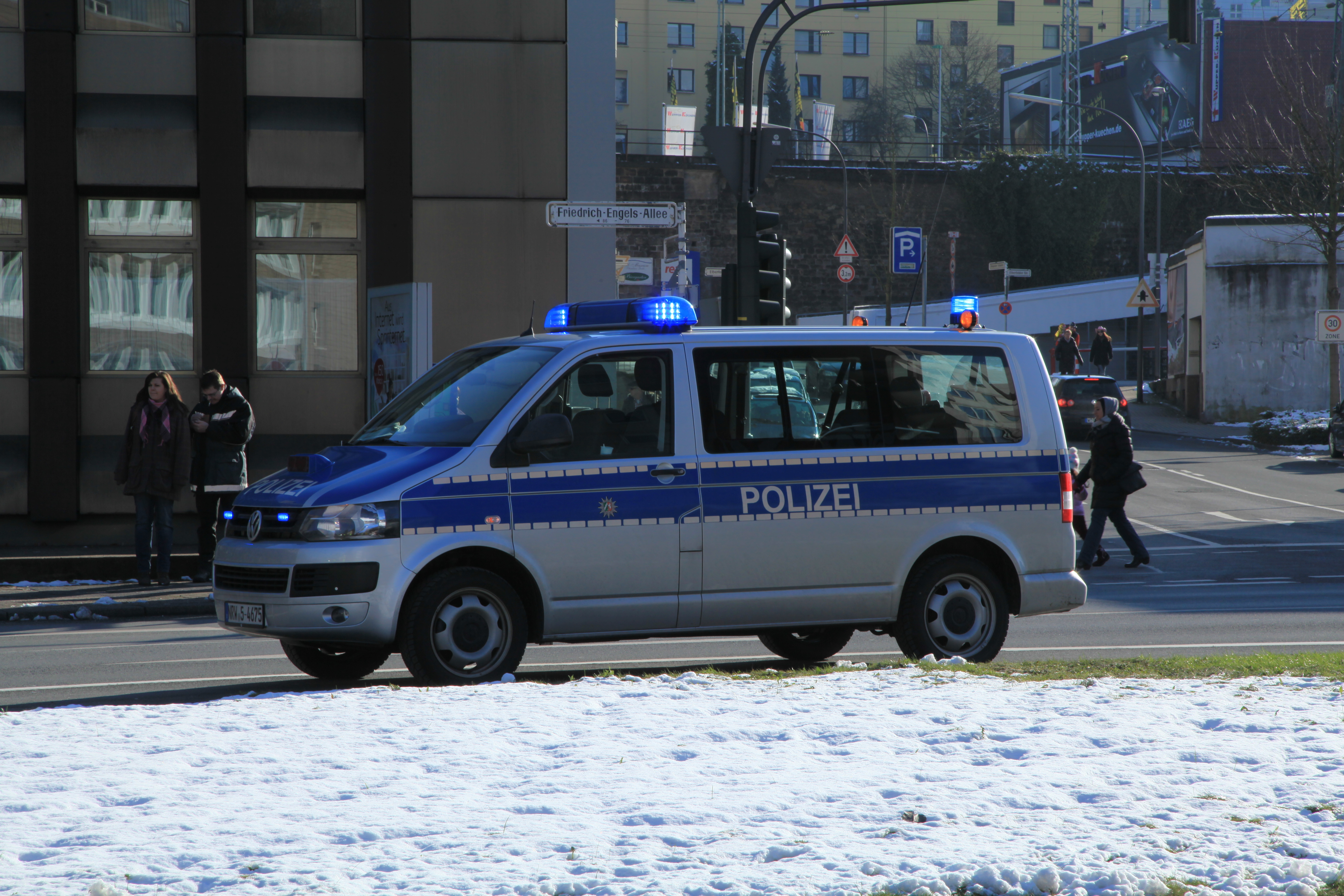 Vor, während und nach dem Wuppertaler Karnevalszug auf der Friedrich-Engels-Allee am 10.02.13 in Wuppertal